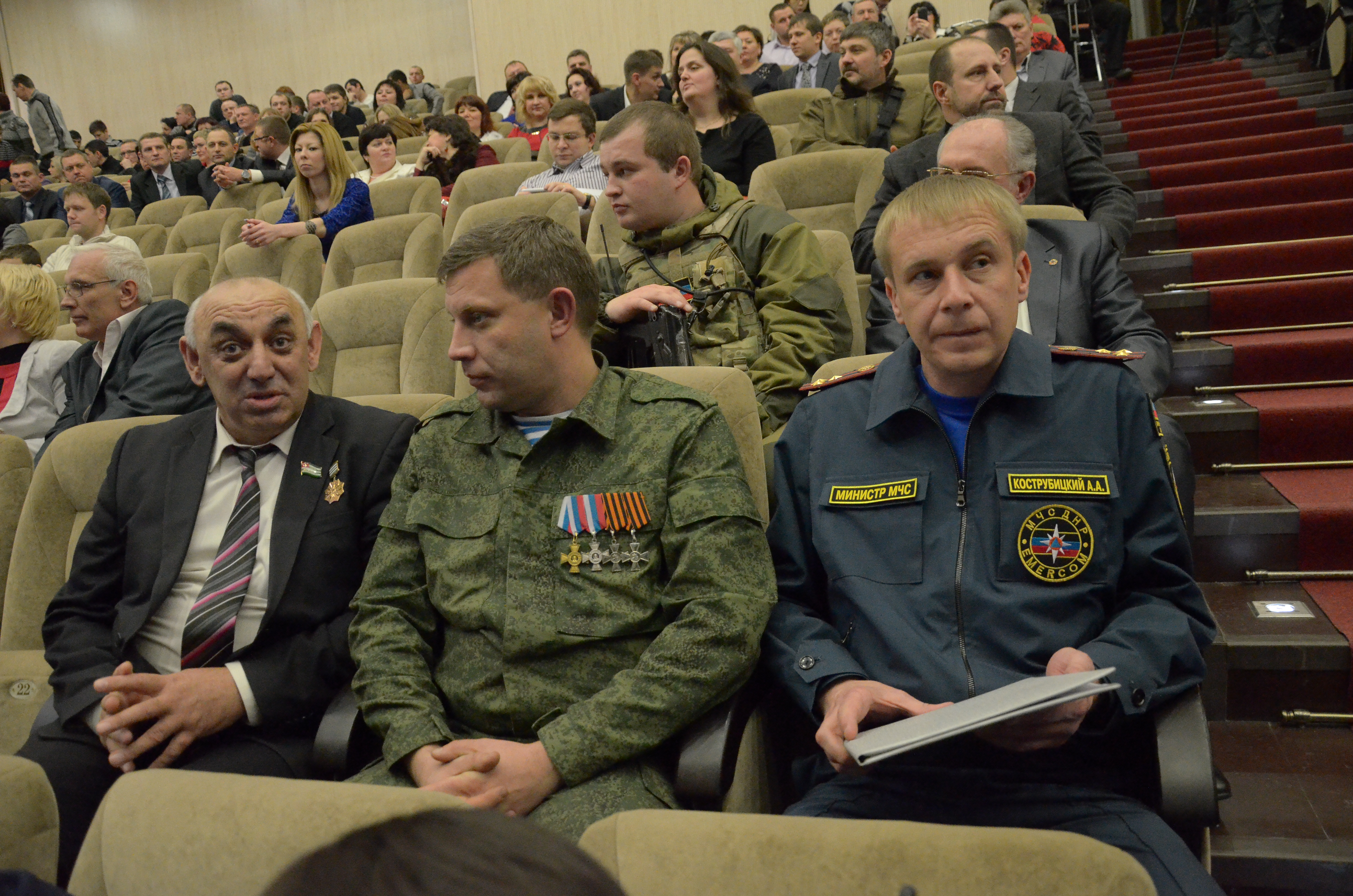 День спасателя в Донецке